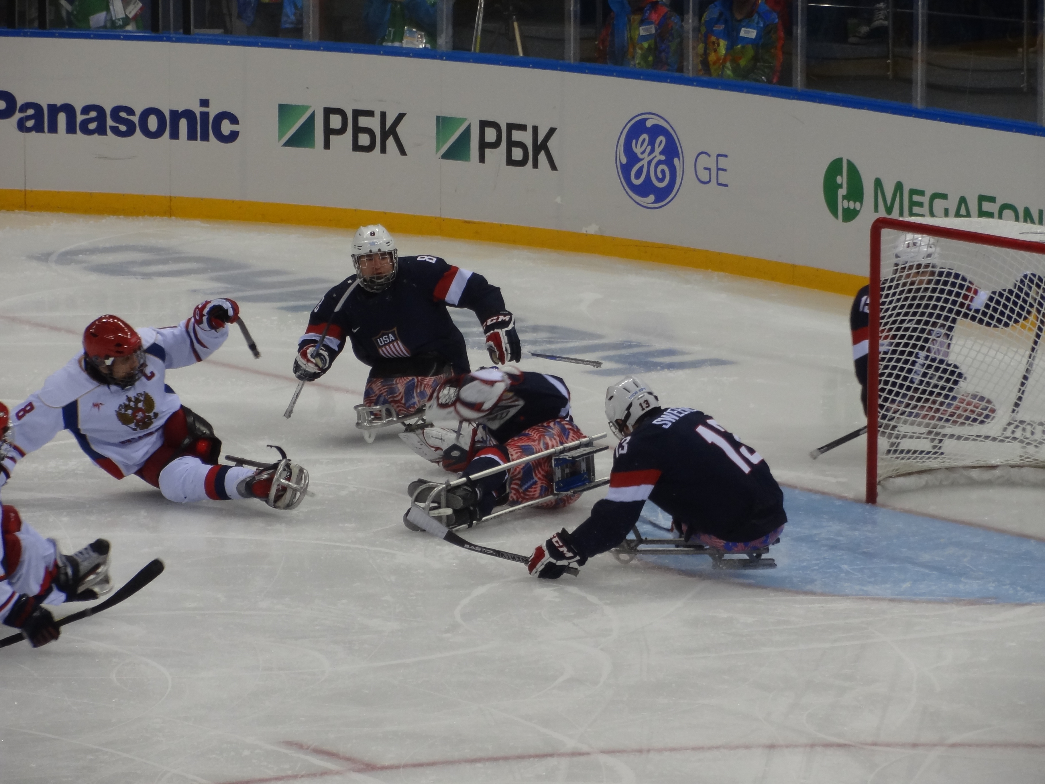 Сочи, 11 марта, 2014 года. Ледовый дворец "Шайба". Сборная России по следж-хоккею одержала победу над командой США на Паралимпиаде в Сочи.